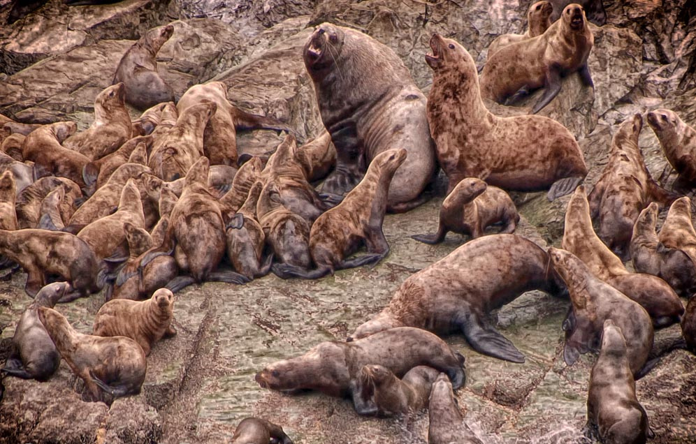 2008 Juneau Steller Sea Lion Harem.jpg